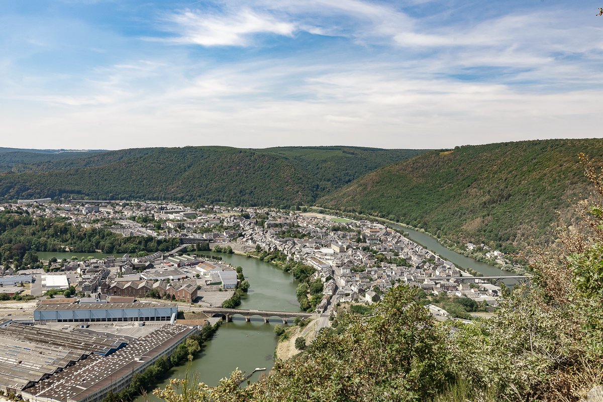 Revin est coupée en 3 parties par les « boucles » de la Meuse